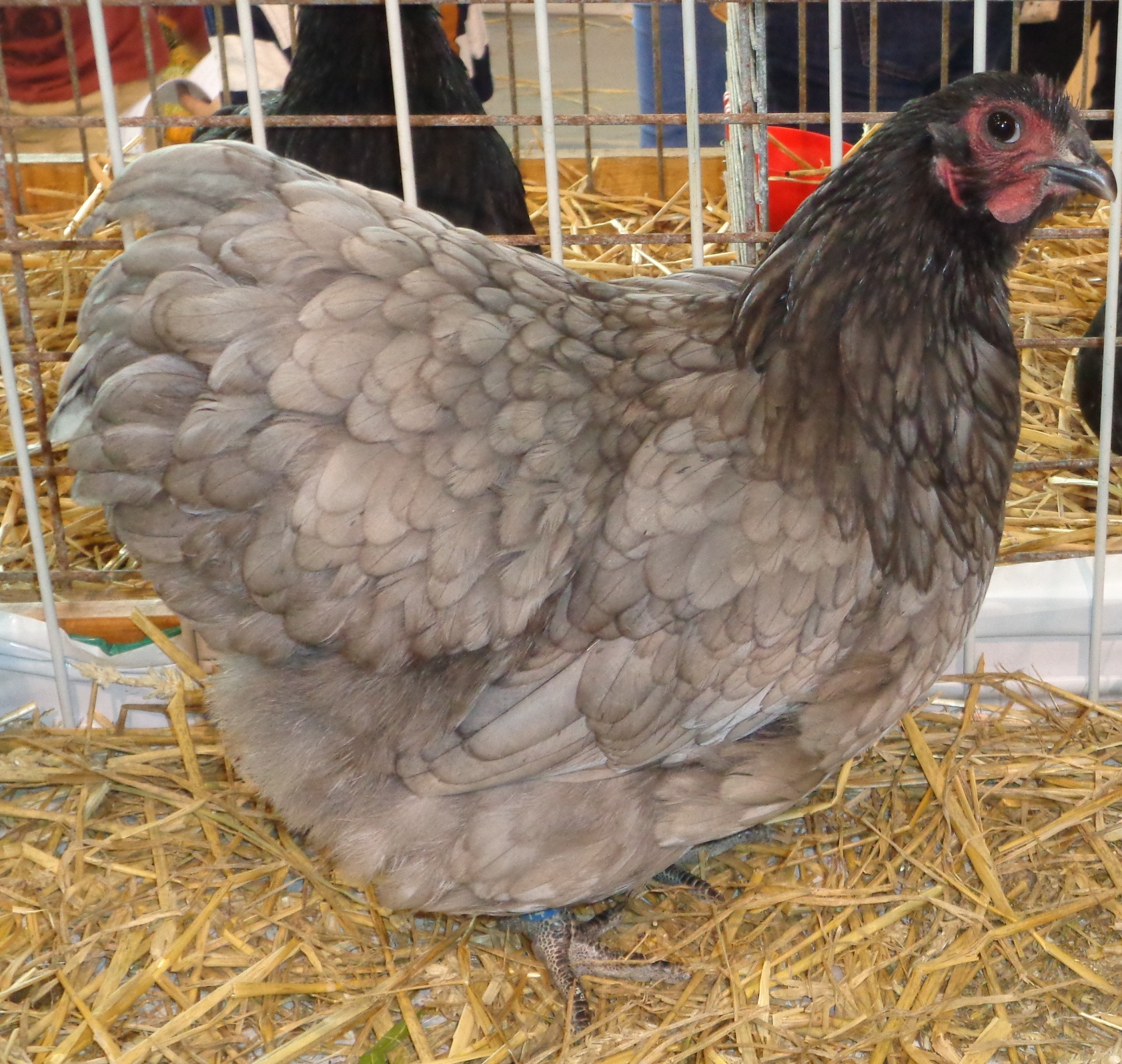 Poule orpington naine au plumage bleu.